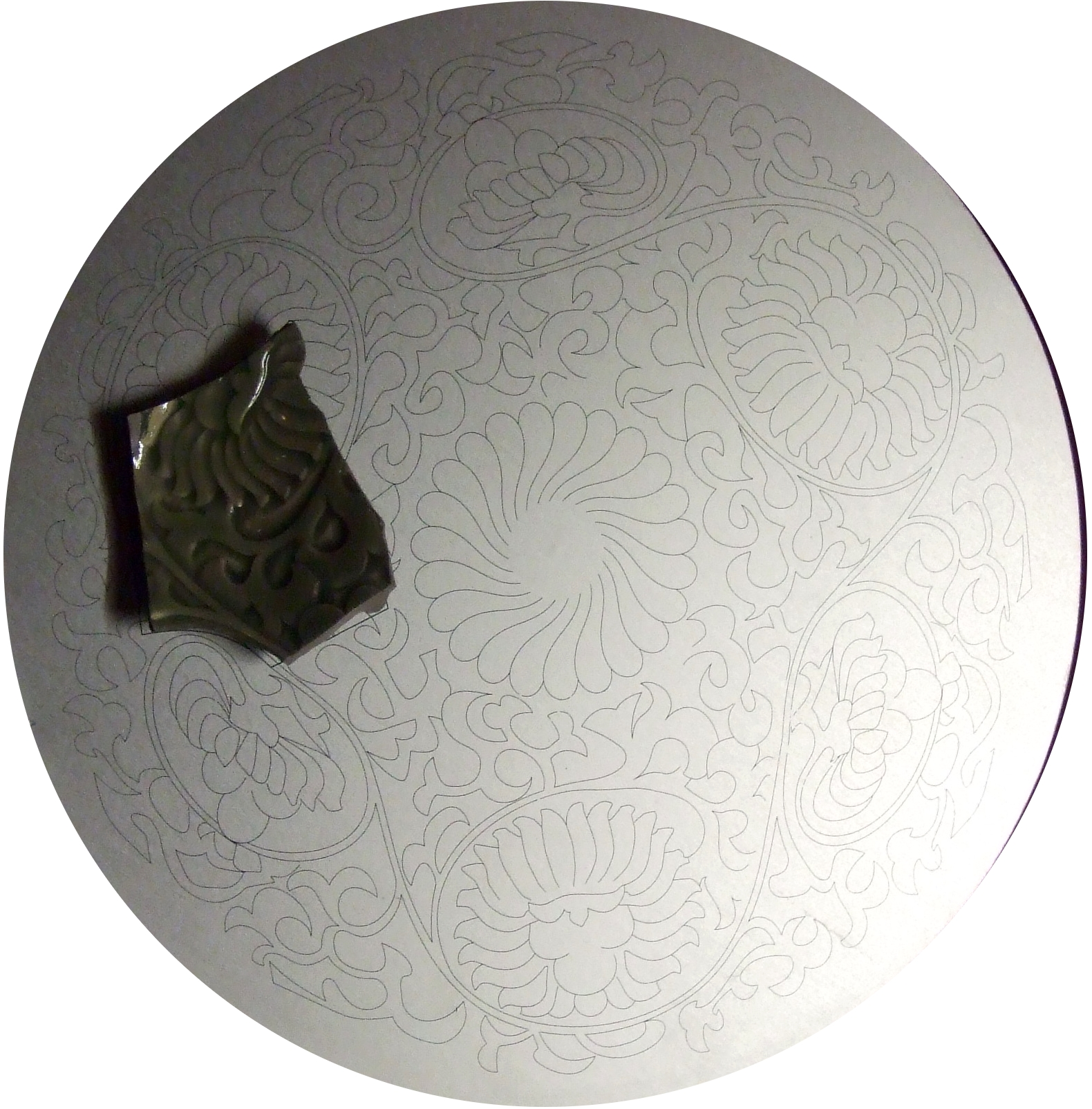 Zaragoza - Aljafería - Plato Plato de Celadón, taller chino (Yaozhou) dinastía Song del Norte, 960-1127 Porcelana verde celadón moldeada y esmaltada Museo de Zaragoza Hallado en la excavación realizada en el palacio de la Aljafería.